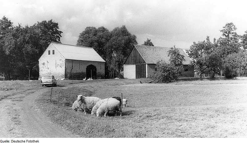 Original image description from the Deutsche Fotothek Malschwitz-Baruth. Mühle, Blick auf die Wirtschaftsgebäude